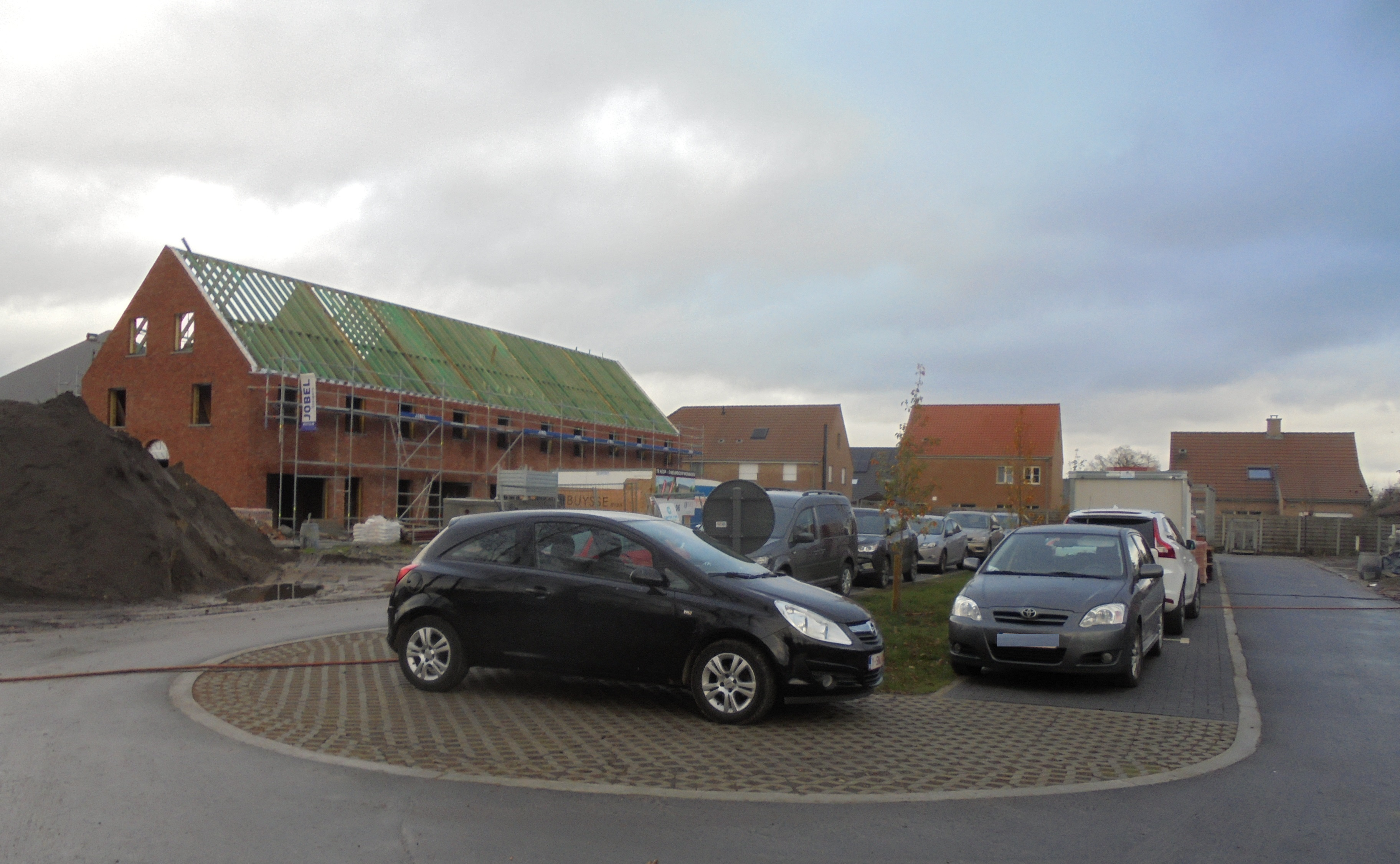 Nieuwe verkaveling - 2018 - Merendreedorp - Merendree - Nevele - Oost-Vlaanderen - België